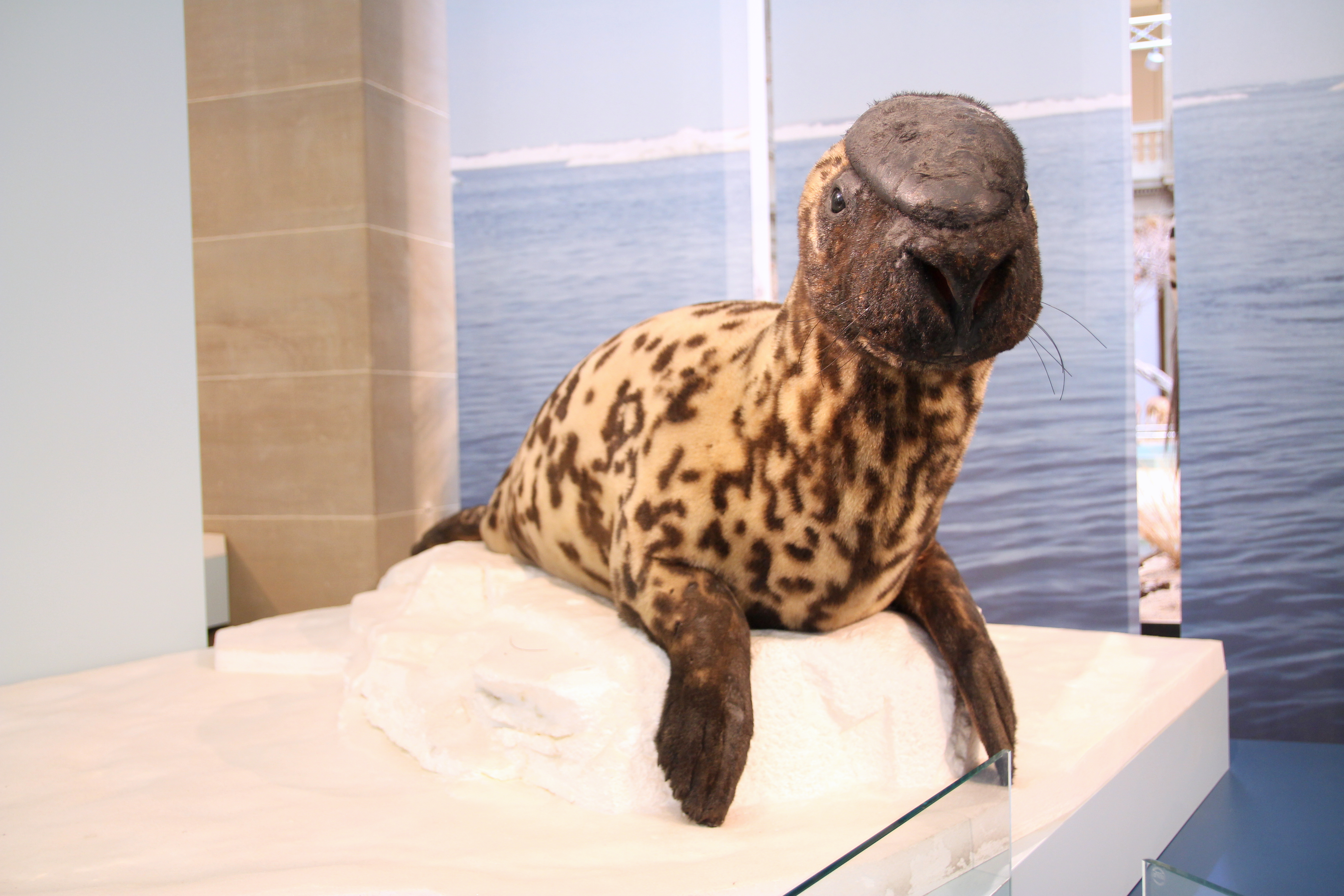 Museum Koenig